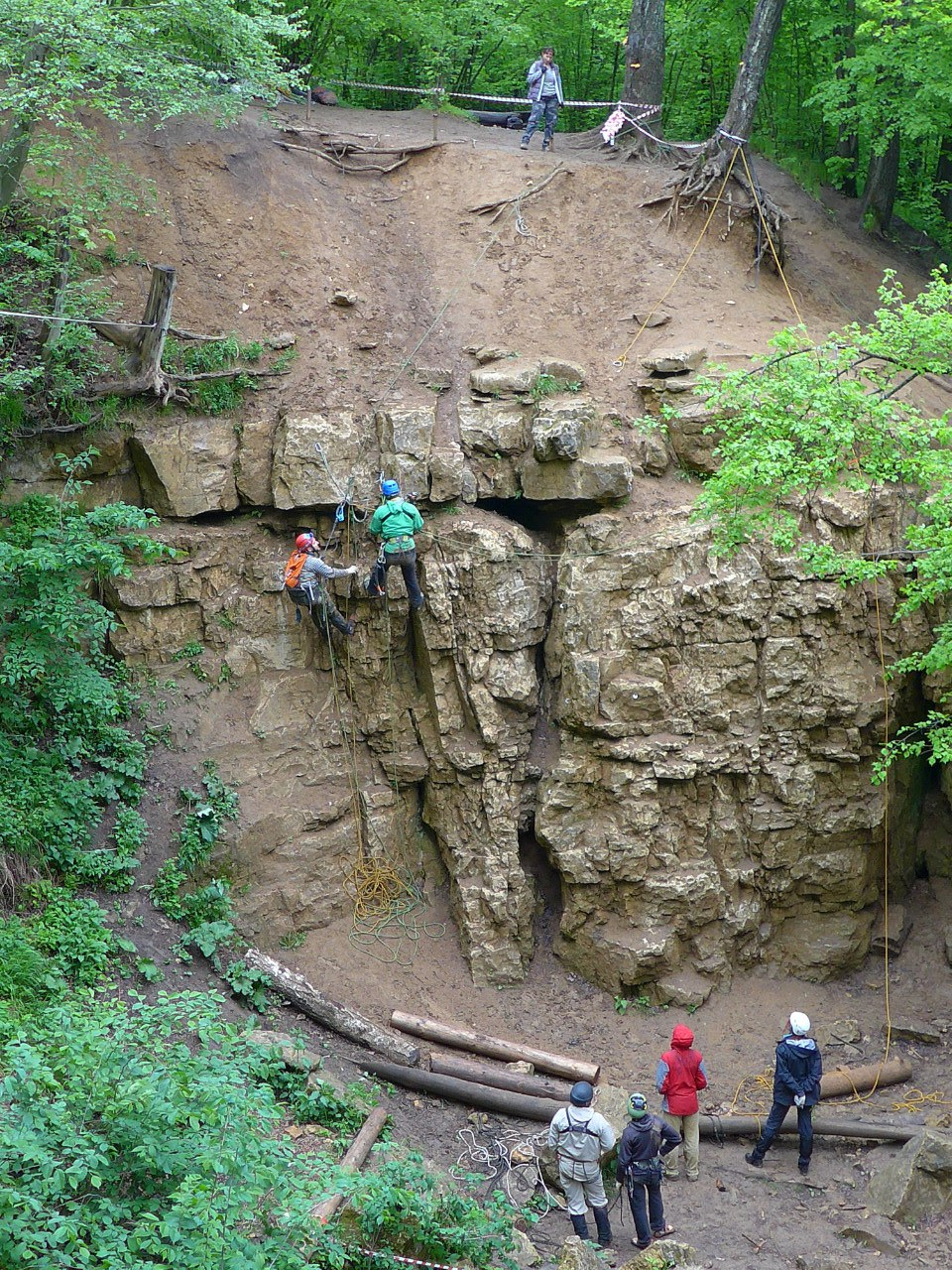 Соревнование в дисциплине: дистанция - горная - связки Чемпионат Московской области по спортивному туризму 2016 г.